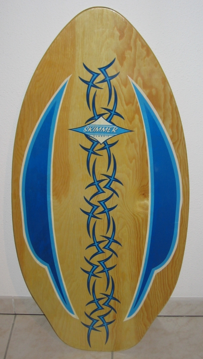 Description: Photo d'un Skimboard amateur Auteur: User:MaximePetazzoni